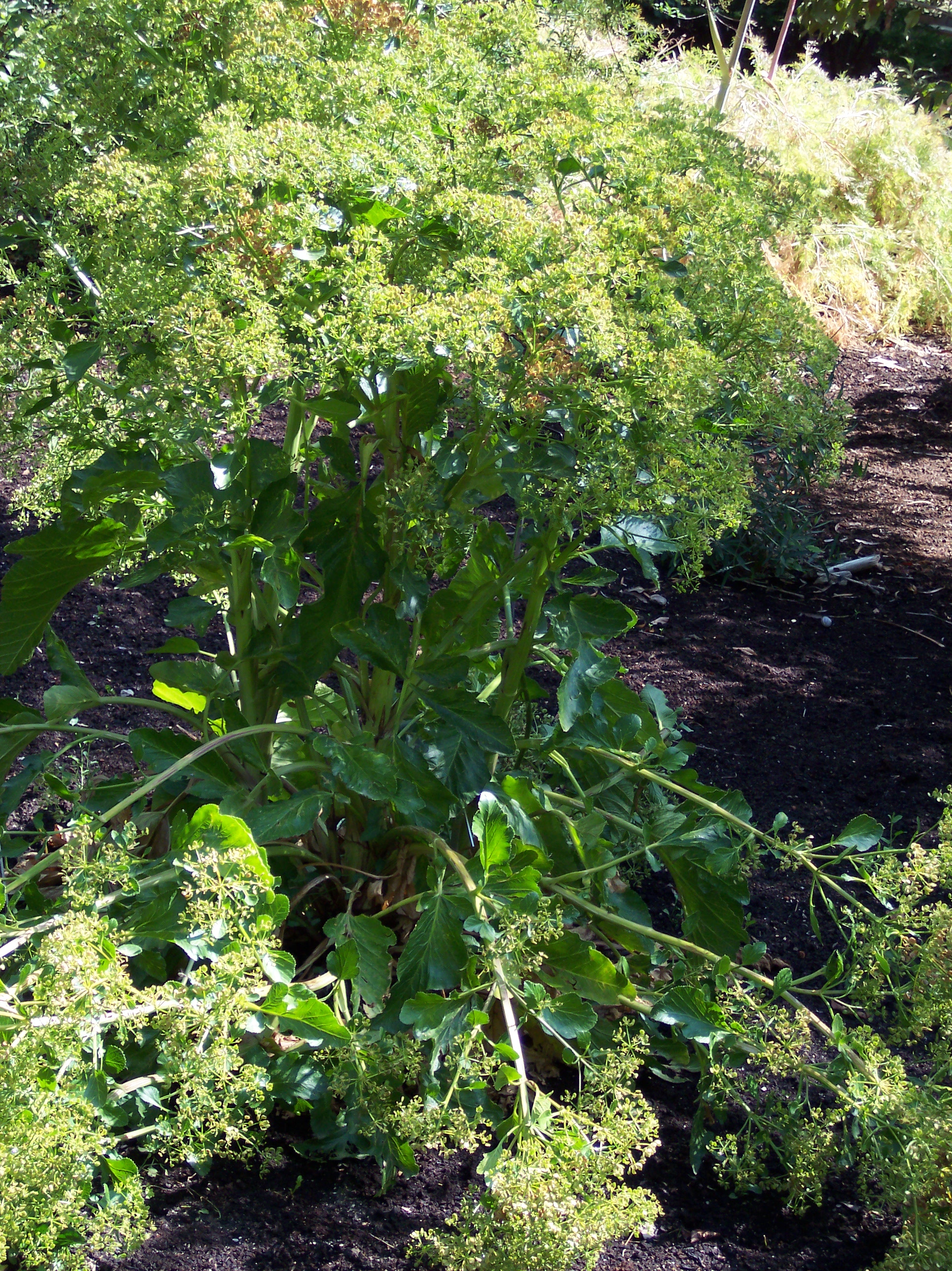 Pastinaca lucida, endemismo de las islas Baleares, España. Plantas del Real Jardín Botánico de Madrid